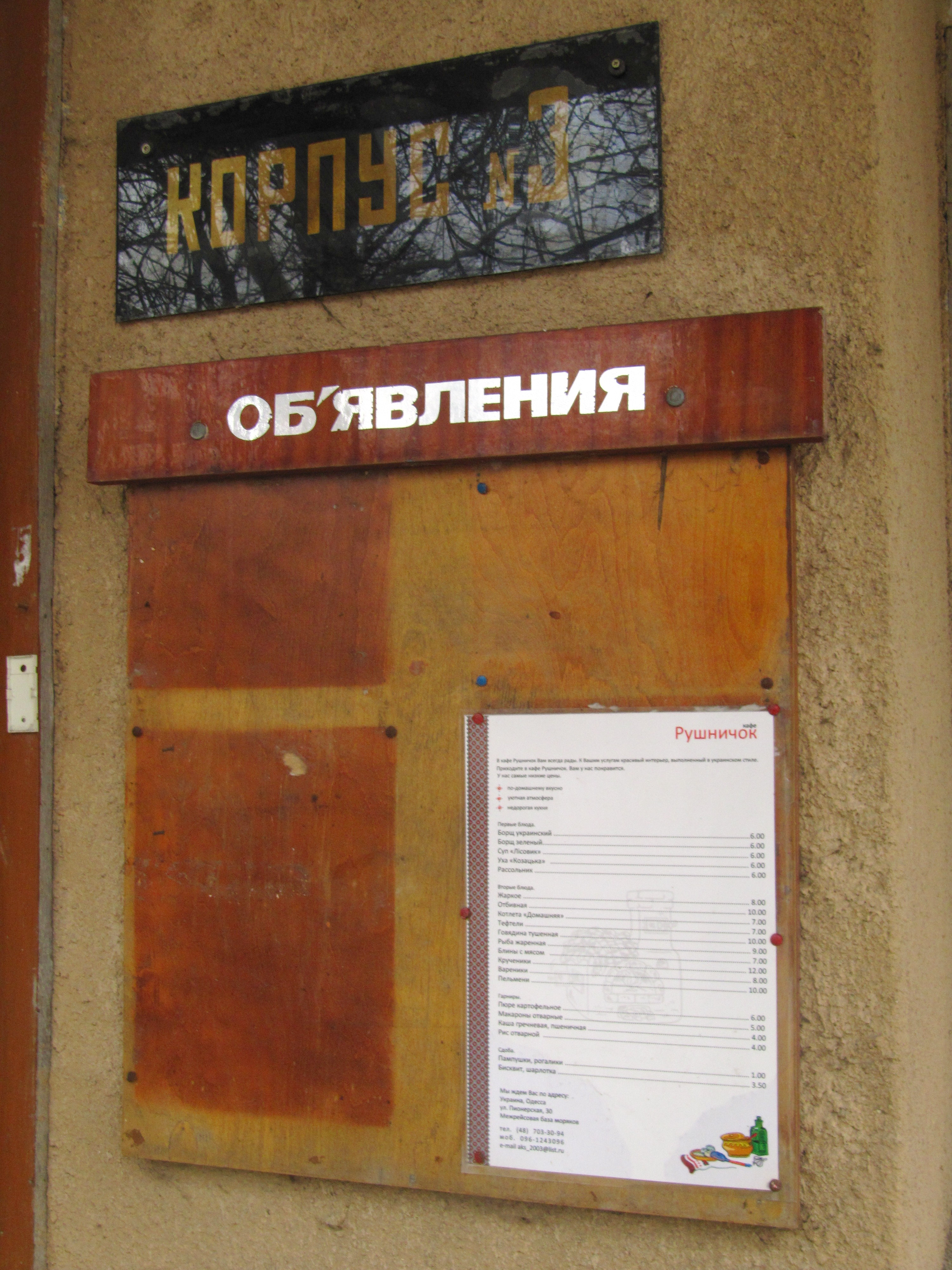 Зрозок використання апострохву в московській мові. Одеса.